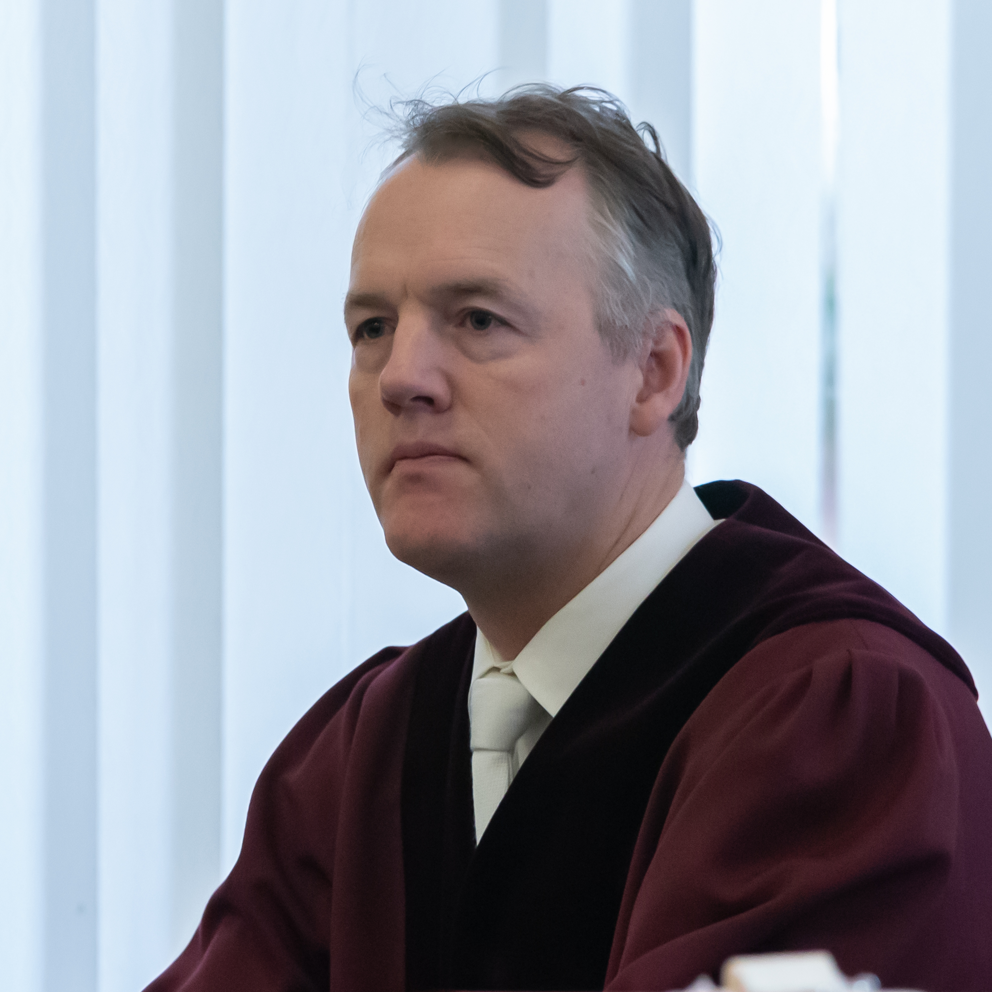 BGH Verhandlungstermin am 31. Oktober 2018 in Sachen I ZR 104/17 (Bundesgerichtshof zur Veröffentlichung von Abbildungen gemeinfreier Kunstwerke): Jörn Feddersen, Richter am Bundesgerichtshof; Porträt, Einzelbild